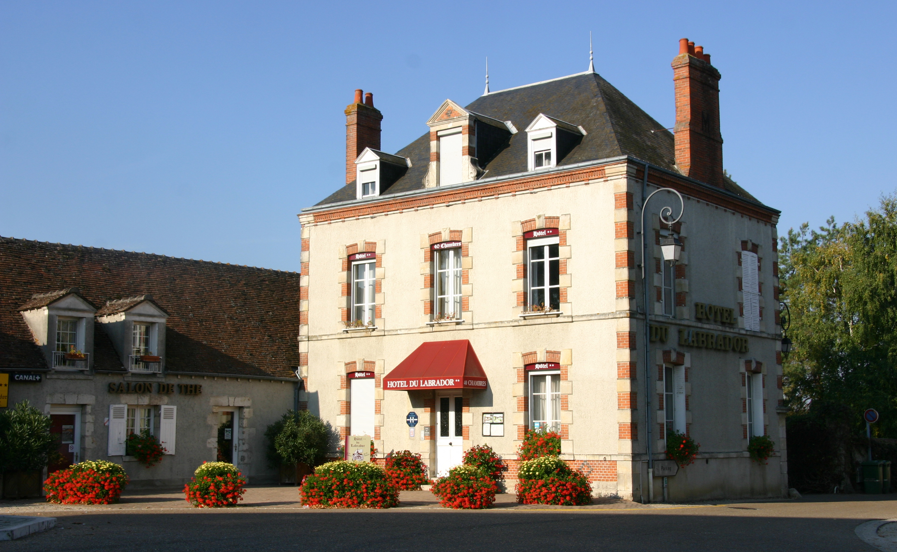 Saint-Benoît-sur-Loire